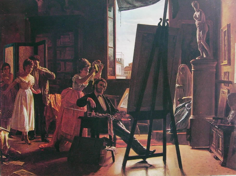 L’alloro